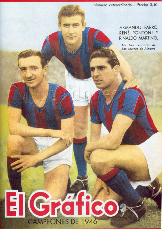 Armando Farro, René Pontoni, Rinaldo Martino. Tapa de la Revista El Grafico del año 1946